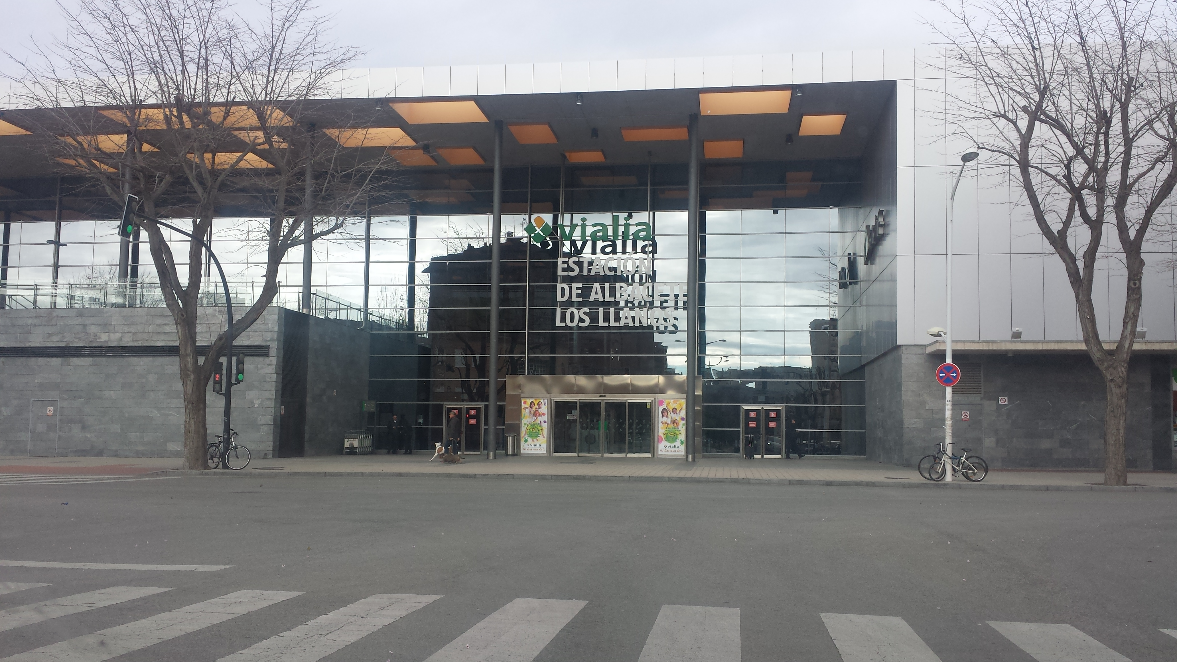 Estación de Albacete-Los Llanos. (Albacete, Castilla-La Mancha).